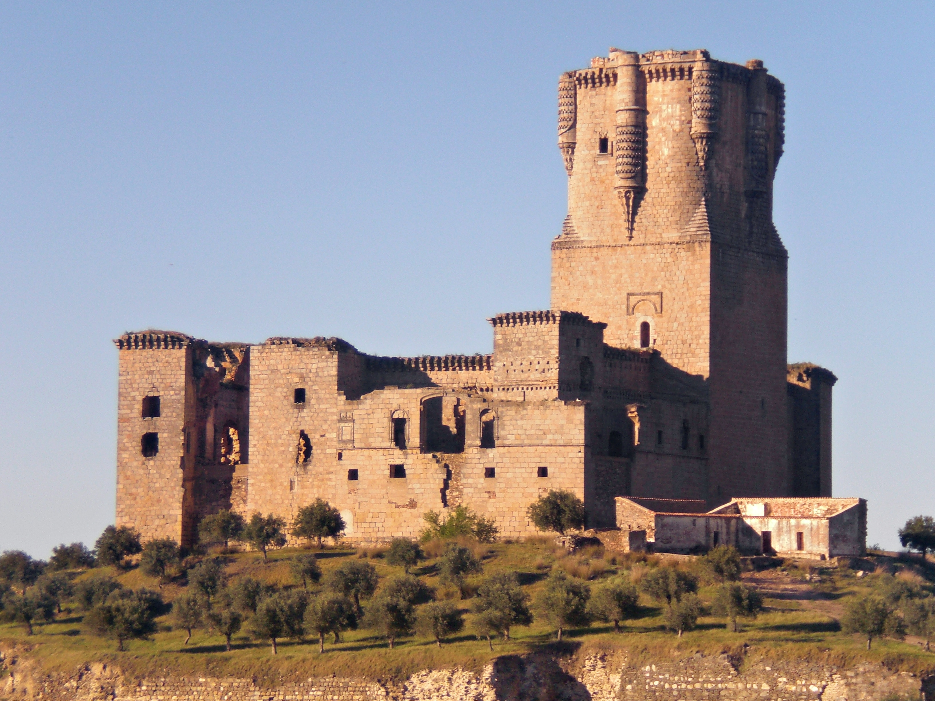 Kastelo de Belalcázar